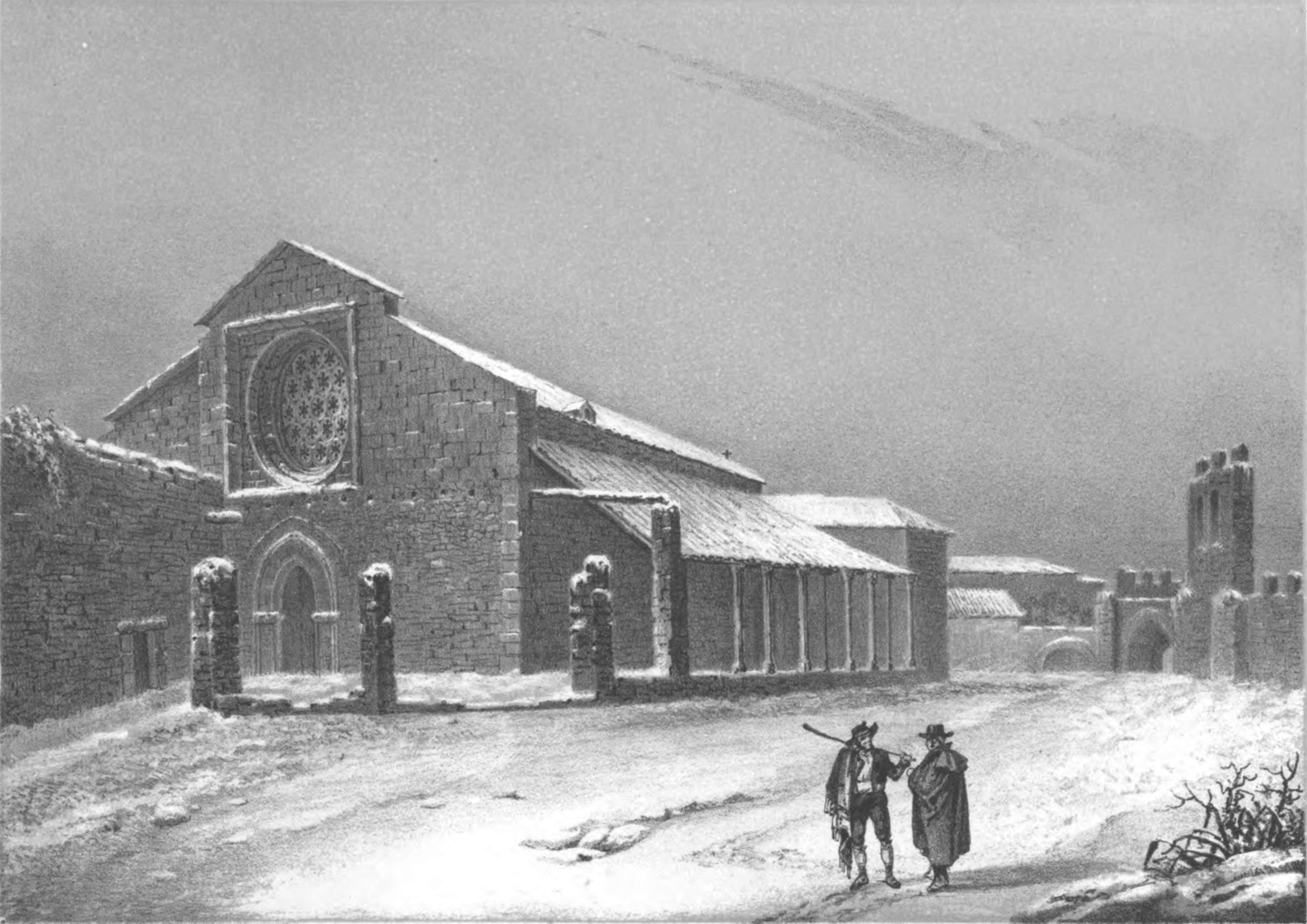 Grabado de Francisco Javier Parcerisa del Santuario de Nuestra Señora de Alarcos, en Alarcos (provincia de Ciudad Real - España) que aparece en el libro: Parcerisa FJ. Recuerdos y bellezas de España: Castilla la Nueva (Tomo II). Madrid: Imprenta de D. José Repullés; 1853. p.500.